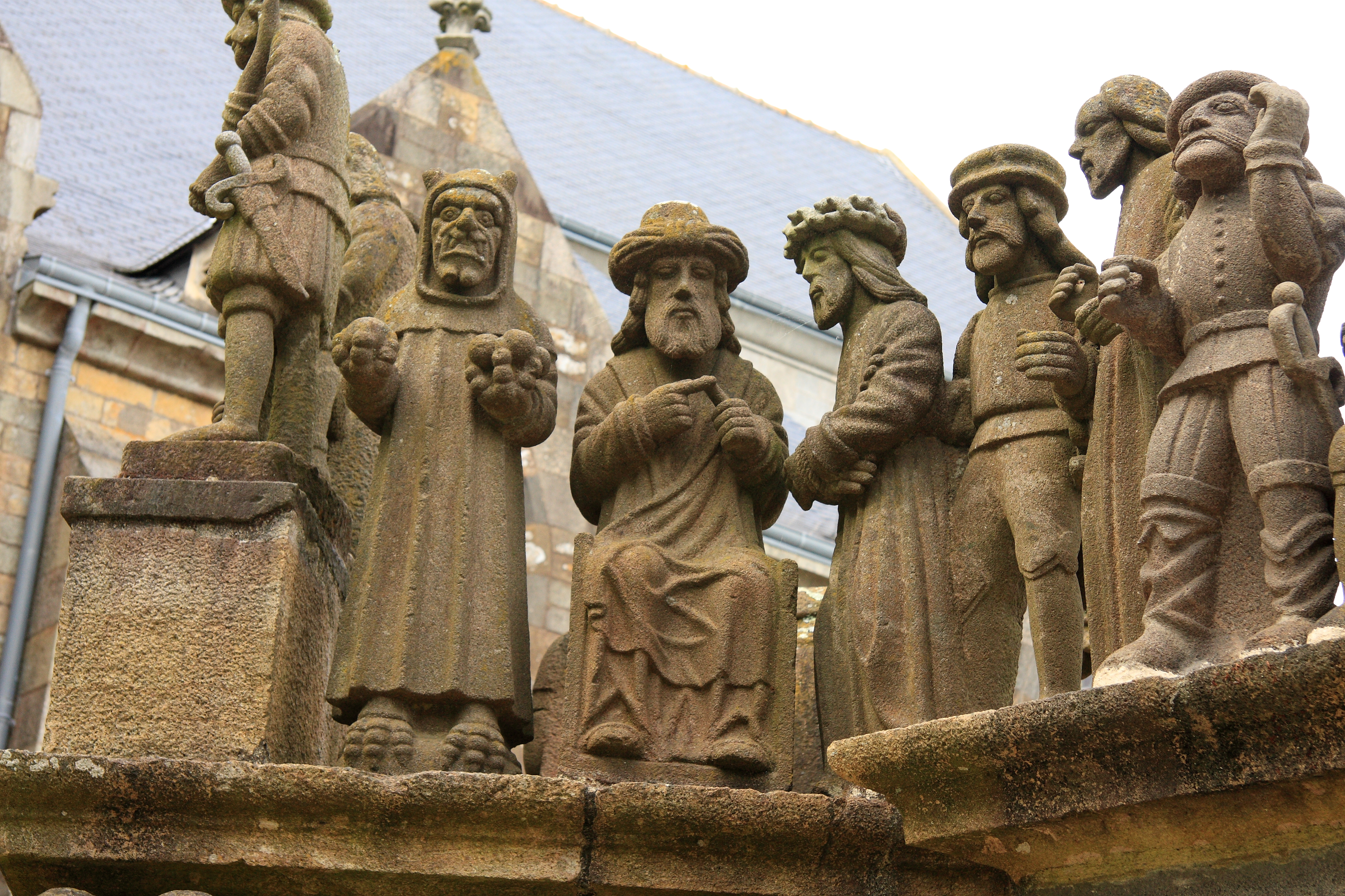 détails du clavaire de ¨Plougastel